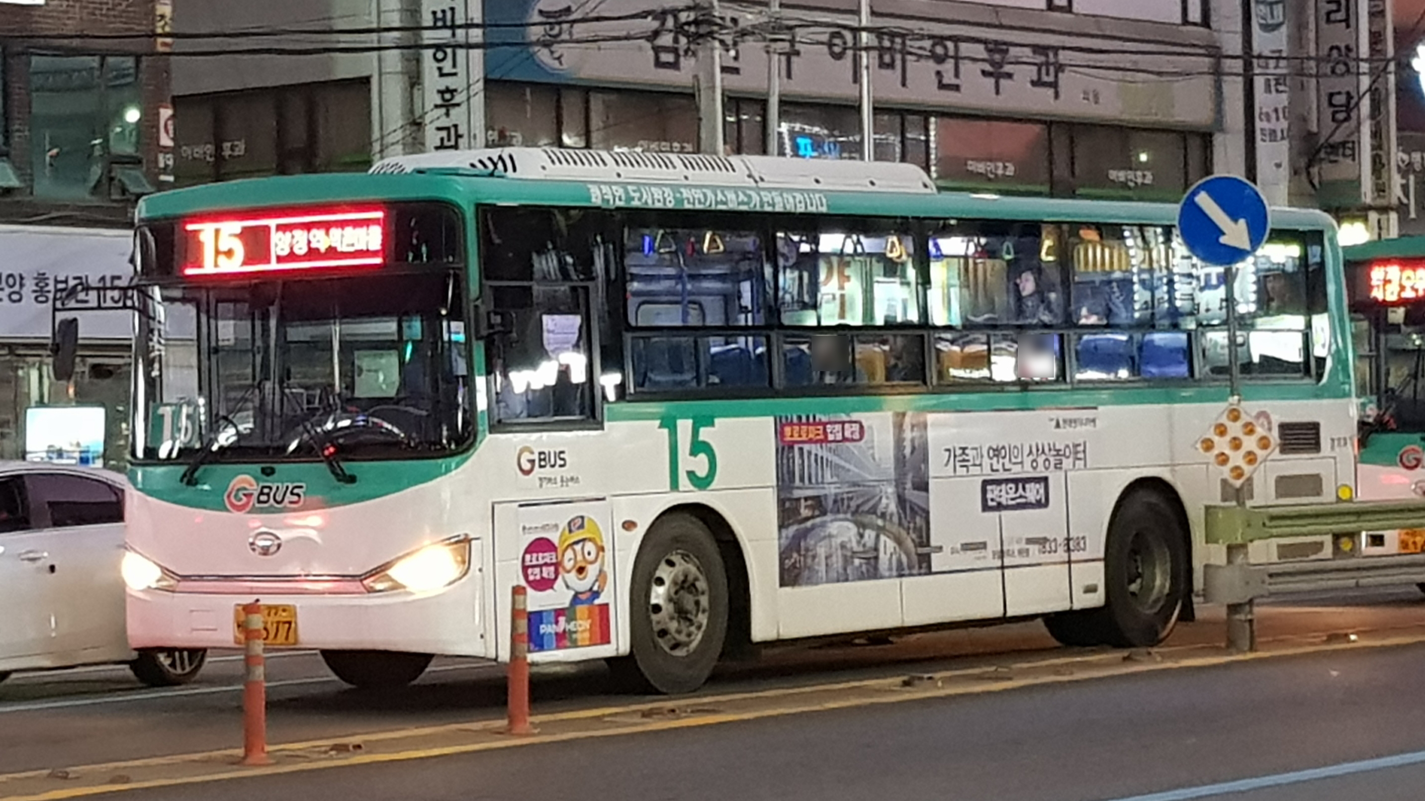 경기여객 구리 일반시내 15번 자일대우 NEW BS106 좌석형 NGV